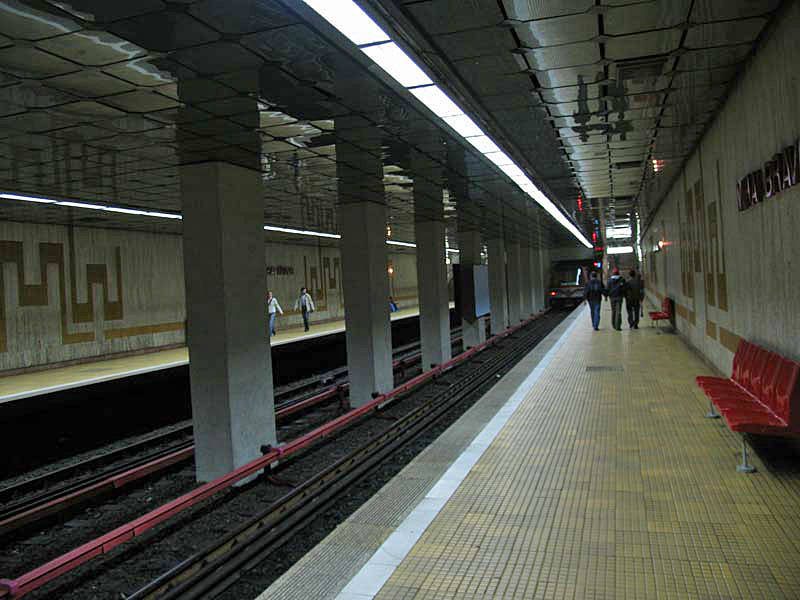 Intérieur de la station Mihai Bravu en 2005.